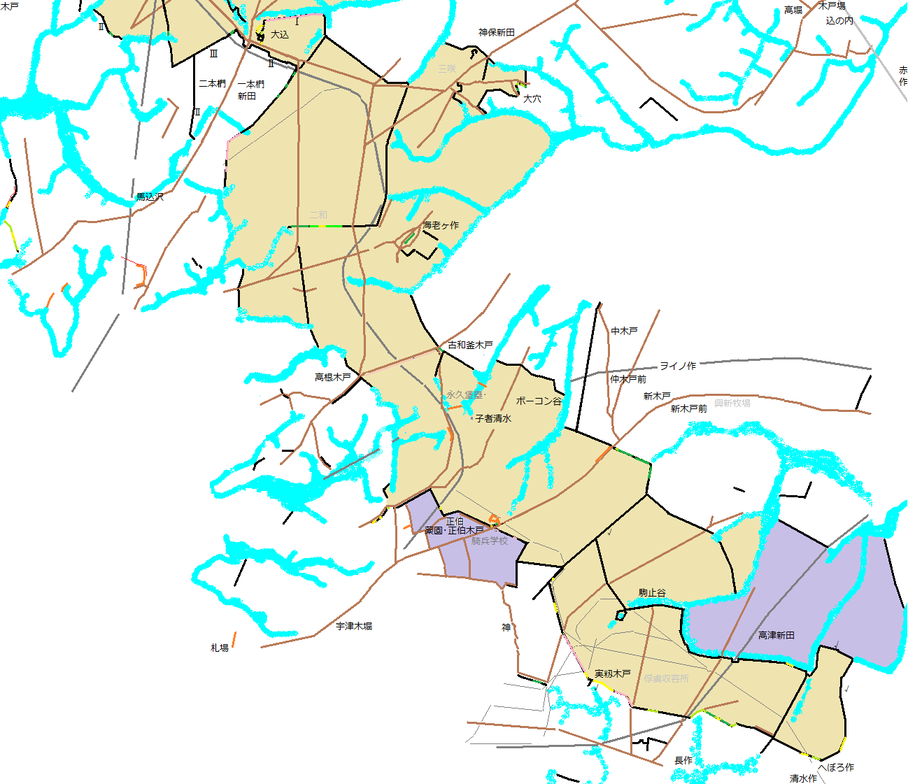 小金牧下野牧地図を明治期の地図上に目分量で作成したもの。